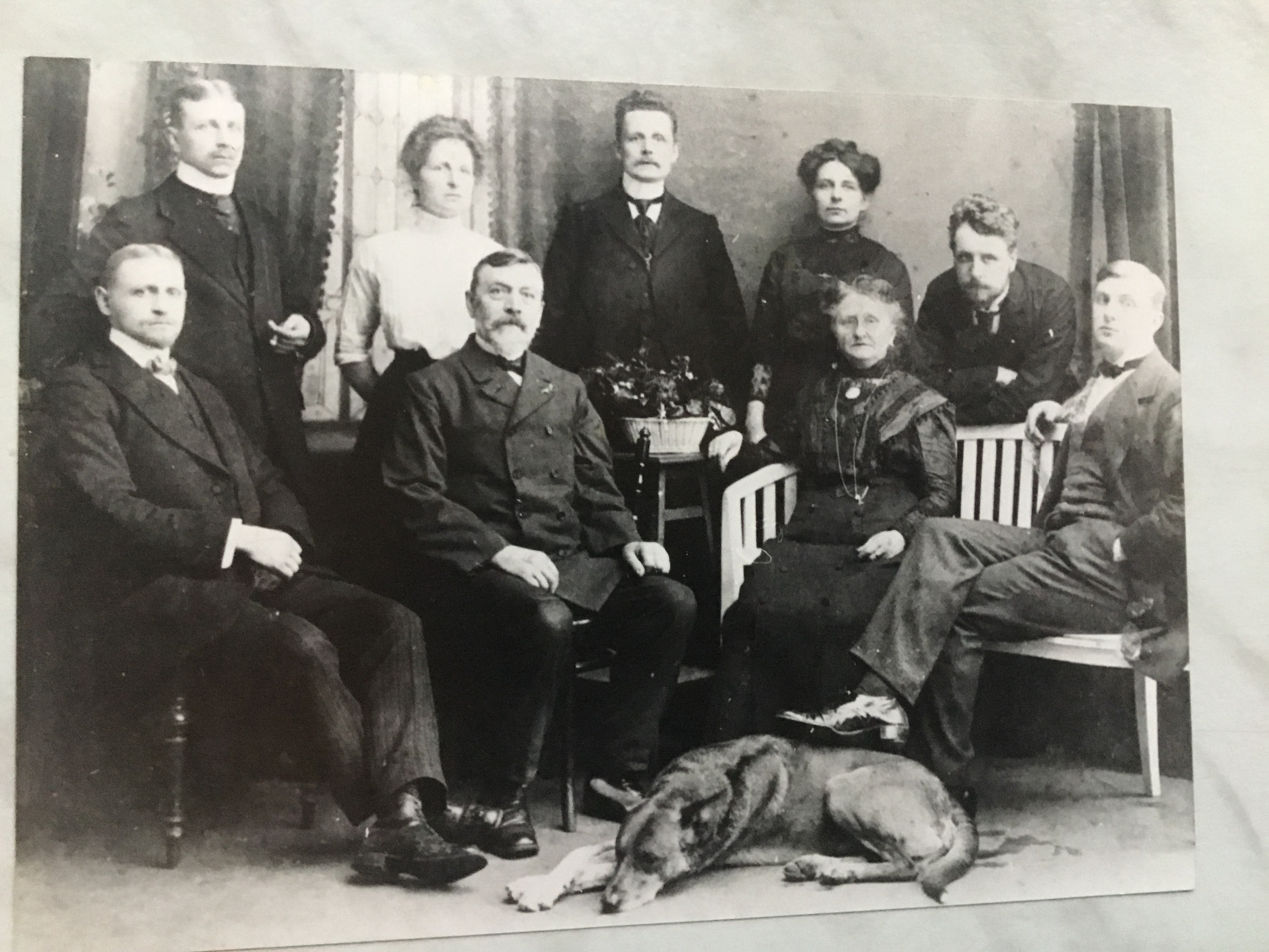 Op de foto staan Dio Huysmans, acteur, rechts zittend met de hand in de broekzak Frans Huysmans, kunstschilder uit de Bergense school, naast Dio, handen over elkaar; Willem Huysmans, acteur, linksboven. Centraal de ouders van Dio, Frans en Willem. Verder de andere kinderen van het gezin.